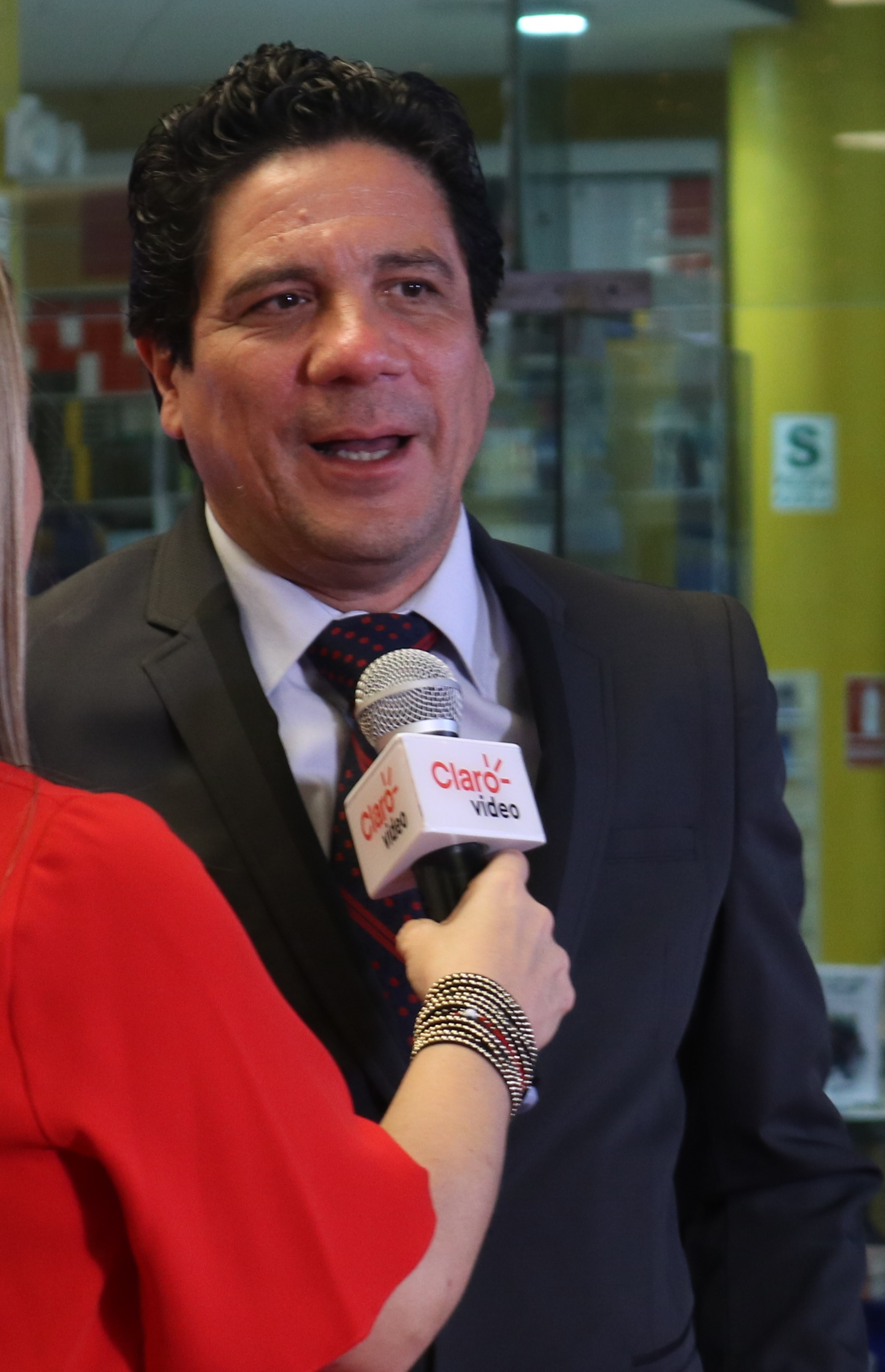 Bruno Odar en 2018.